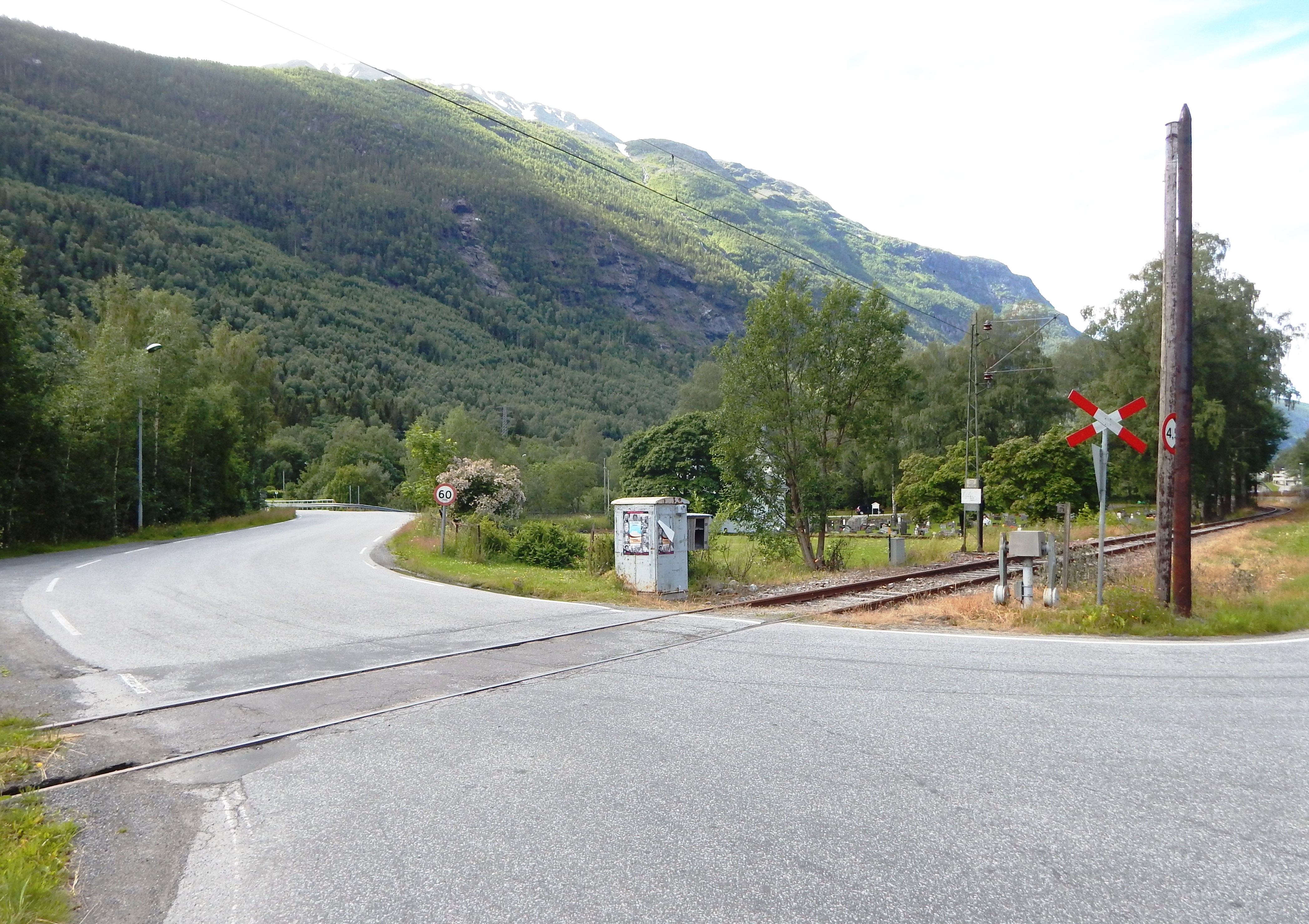 Fylkesvei 651 krysser Rjukanbanen ved Dale i Tinn.